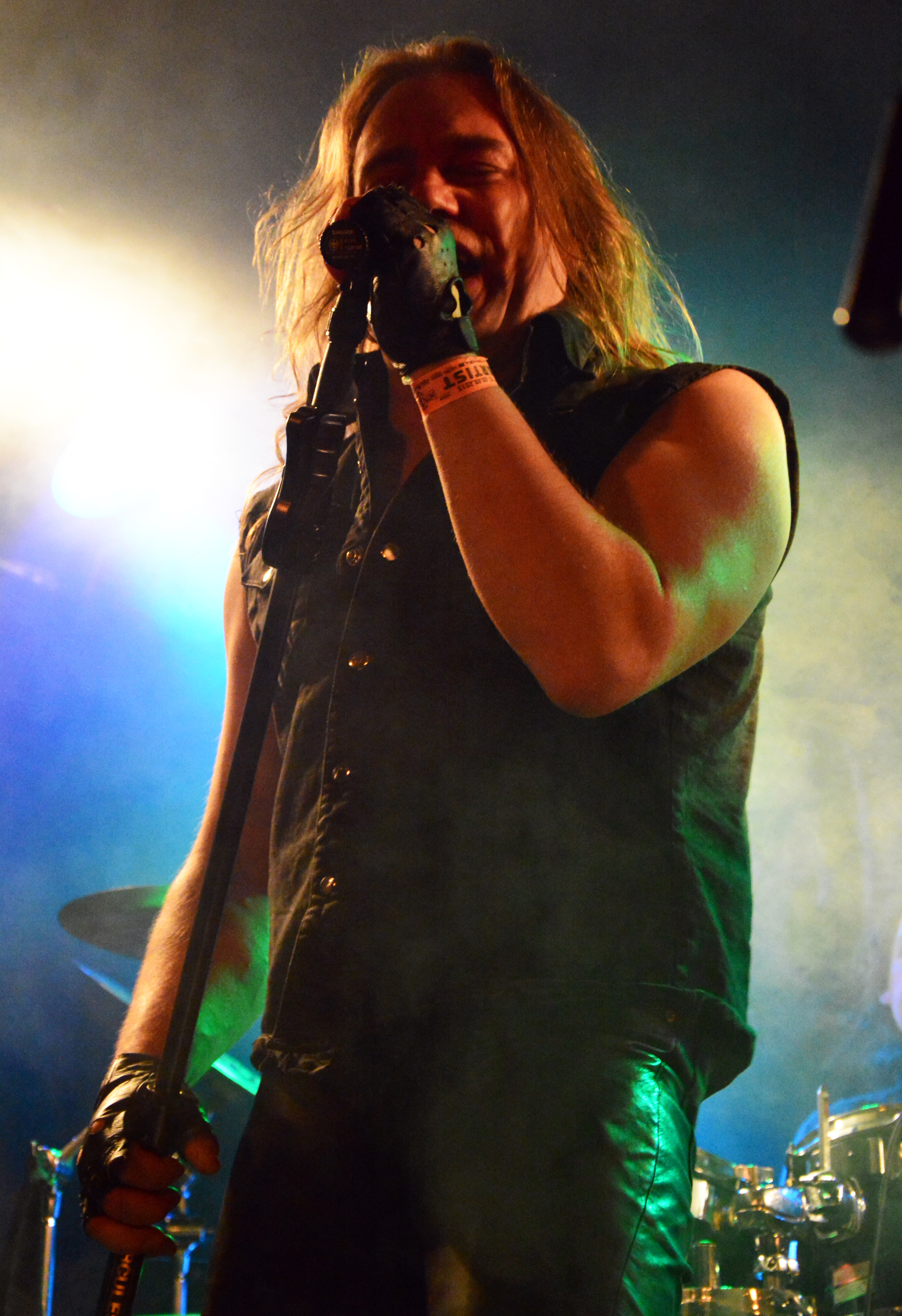 Sänger Andreas Babuschkin von Paragon bei den Hamburg Metal Dayz 2013